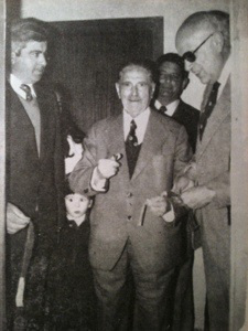 Gregorio Prieto (centro) junto a los alcaldes de Malanquilla y Calatayud, inaugurando una exposición en Malanquilla en 1981.